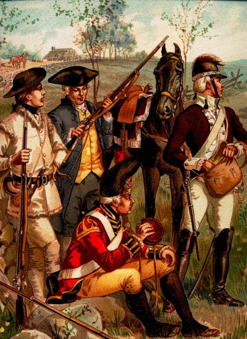 Uniformen diverser unabhängiger Kompanien (Independent Companies) der Kontinentalarmee, 1775